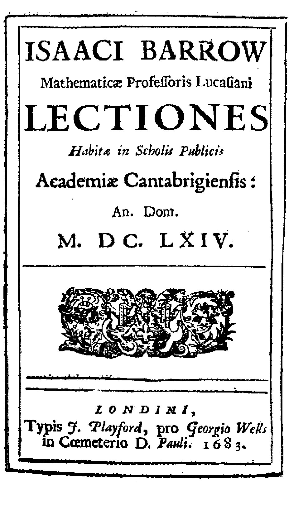 Isaaci Barrow ... Lectiones habitae in scholiis publicis academiae Cantabrigiensis: an. dom. 1664. - Londini : typis J. Playford : pro Georgio Wells in Coemeterio D. Pauli, 1683. - [4], XXXVII, [1], 151, [1] p. : ill. ; 8º .